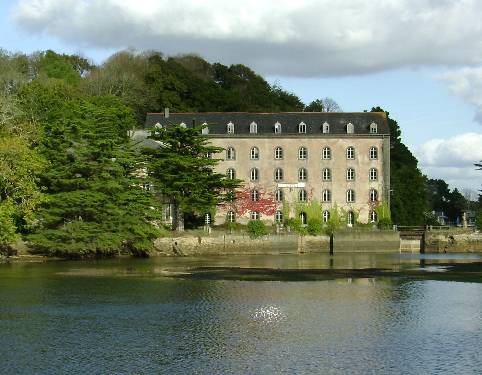 Étang de Moulin-Mer